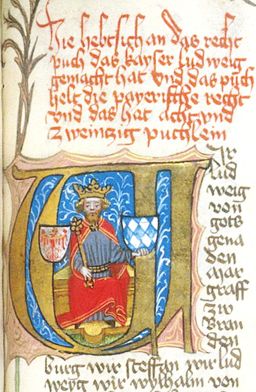 Kaiser Ludwig IV. der Bayer dargestellt im Inizialbuchstaben W zu Beginn 'das recht puch das kayser ludweig gemacht hat'. (British Library, MS Arundel 131 f. 108)